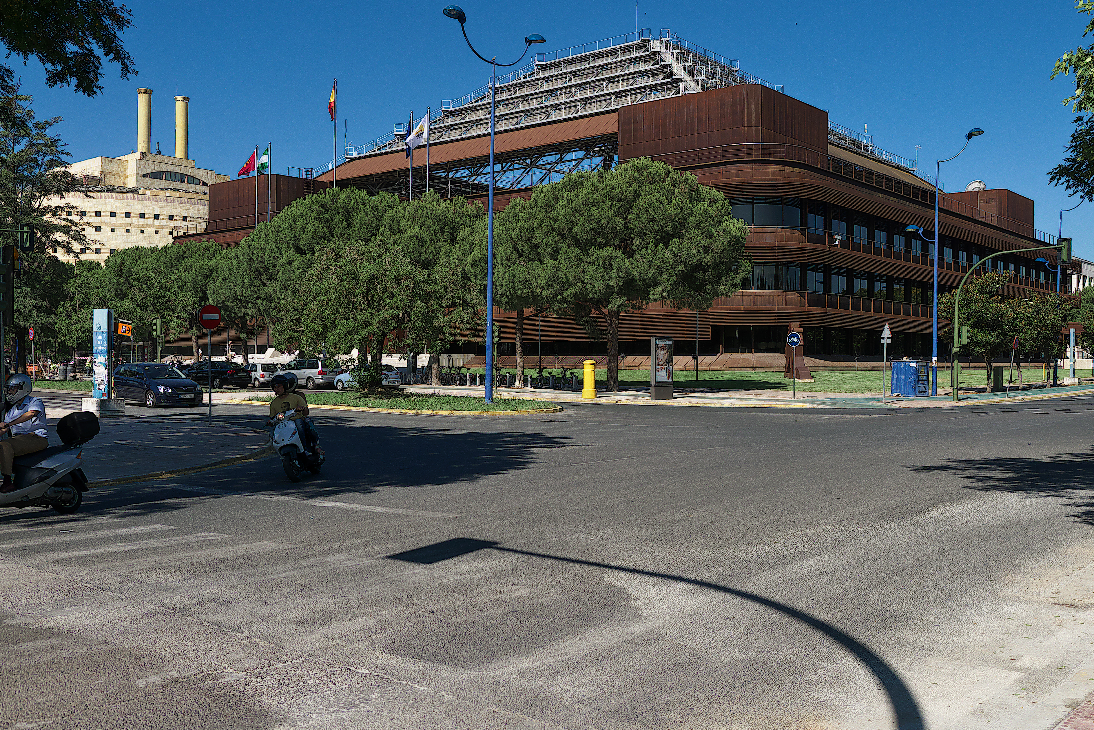 Una pirámide de Antonio Vázquez de Castro para la Expo'92